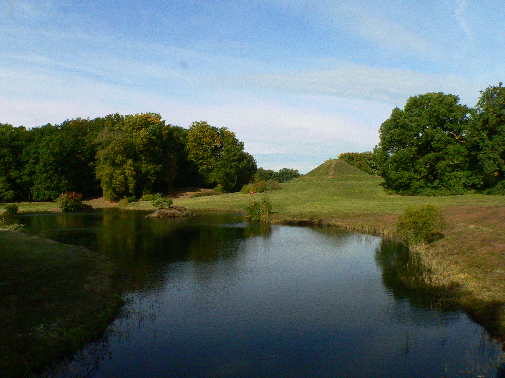 Cottbus - Branitzer Park Pyramide II